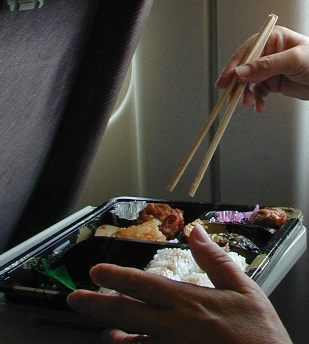 Ekiben: scatola contenete cibo da portare in viaggio, in uso in Giappone a bordo dello Shinkansen Hikari, nei pressi della stazione di Kyoto